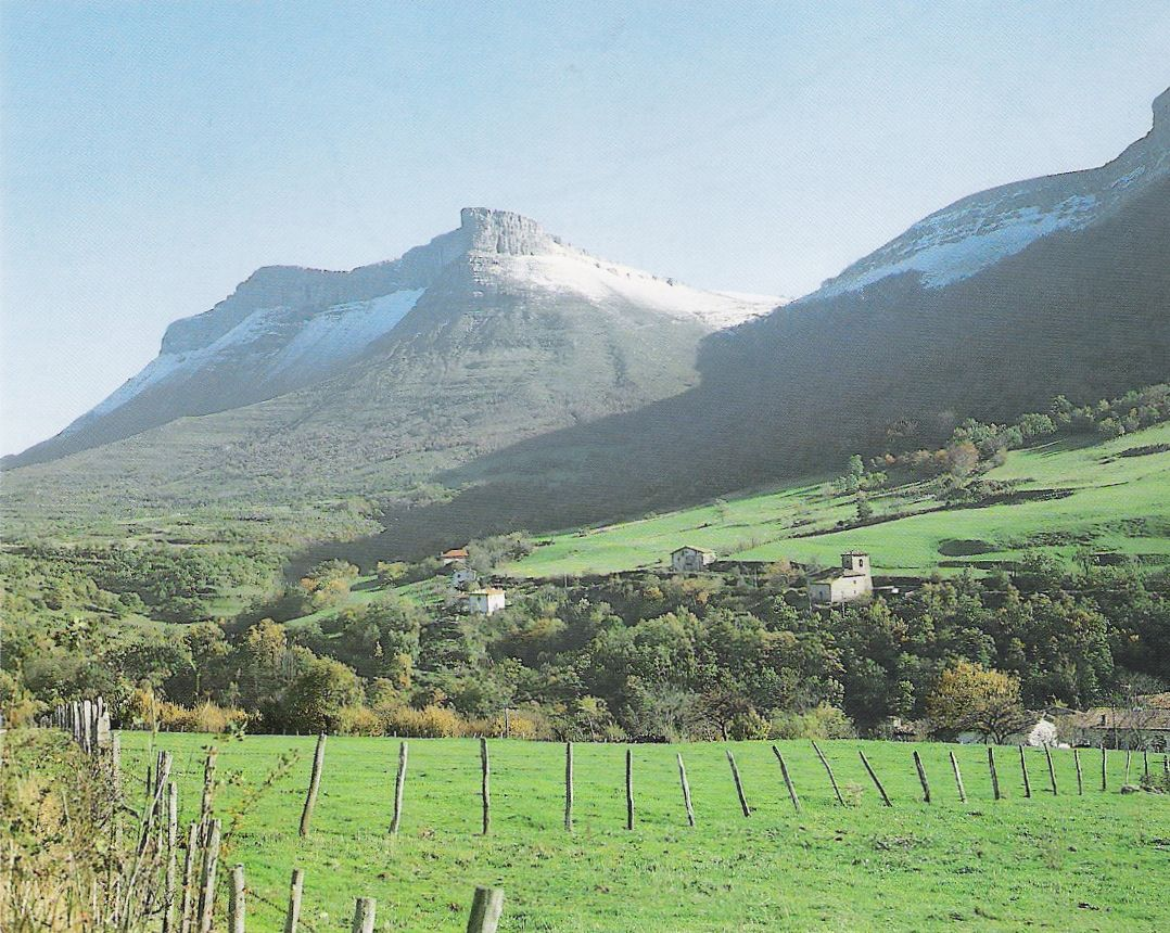 Imagen del Valle de Mena, en Burgos (España)